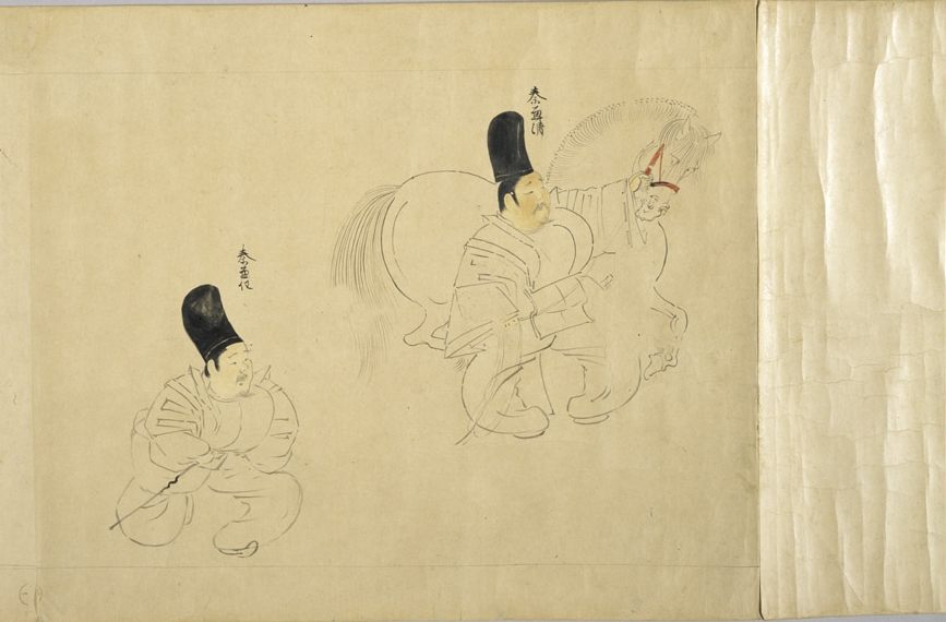 Copie du Zuijin teiki emaki, rouleau enluminé japonais du XIIIe siècle, réalisée par Kanō Kazunobu au XIXe siècle.